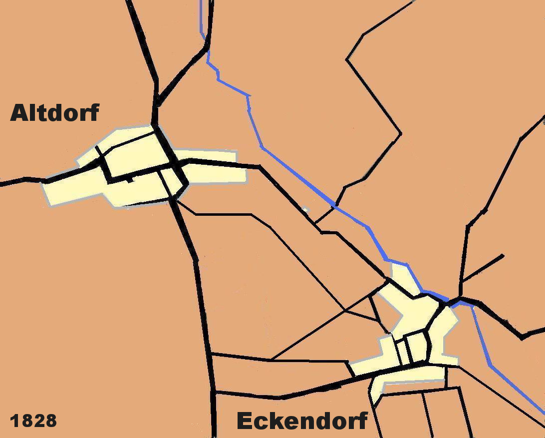 plan sommaire de la commune d'Alteckendorf en 1828, Légende: noir=routes, bleu=ruisseau du Landgraben, jaune pale=zone urbanisée orange= champs et/ou prairies